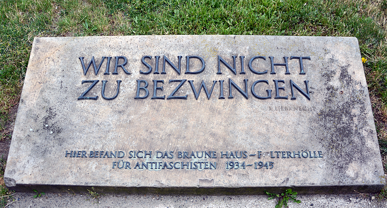 Hier stand das "Braune Hause", Gedenktafel in Magdeburg